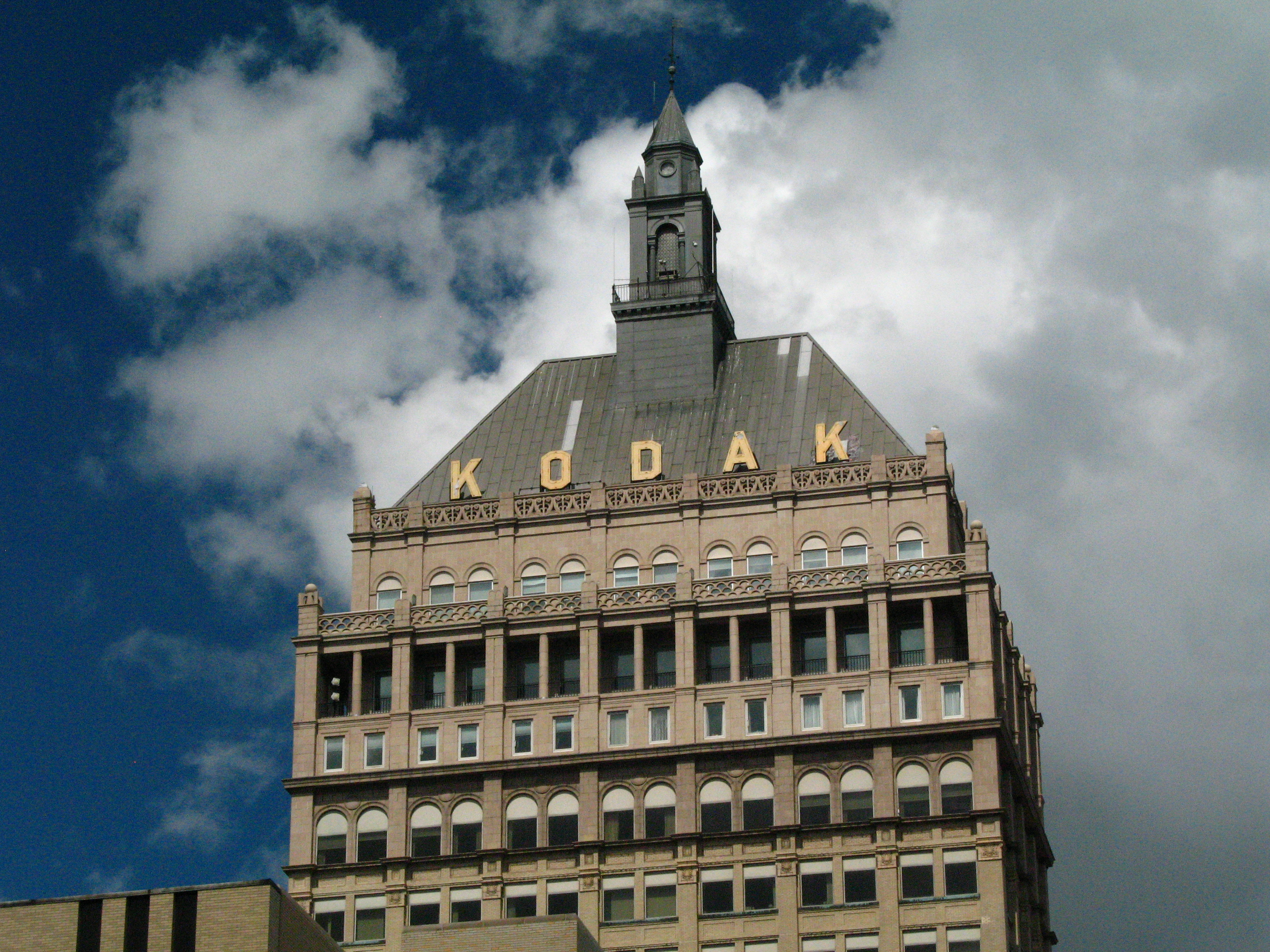 080809_Kodak_Tower_Top